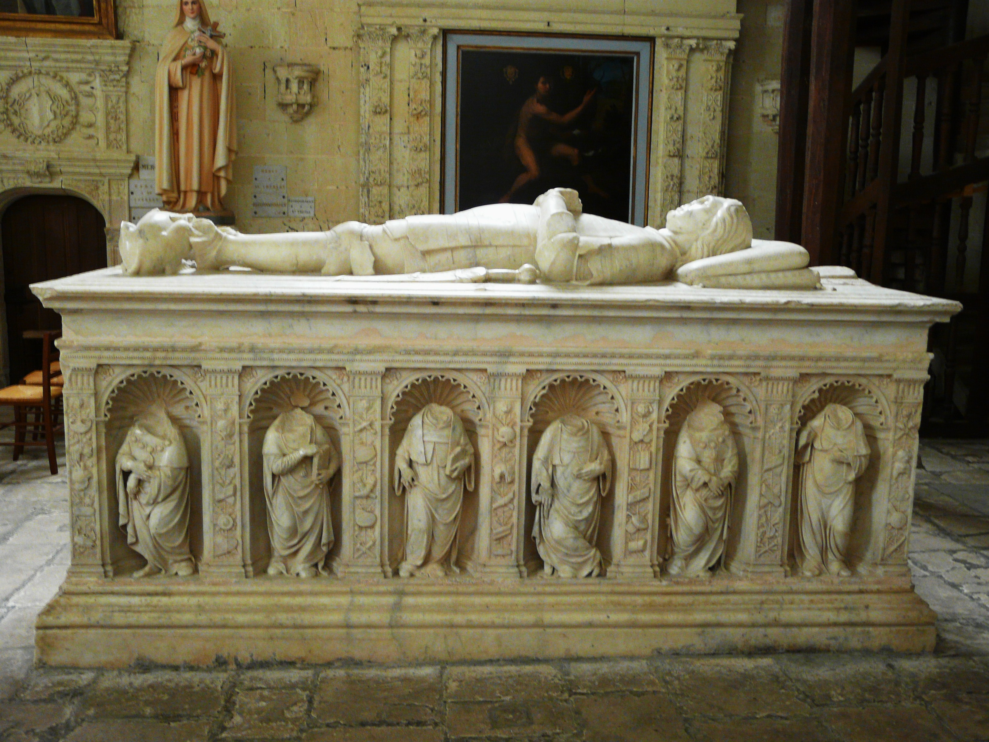 Gisant d'Arthus Gouffier, intérieur de la Collégiale Saint Maurice d'Oiron, Deux-Sèvres, France